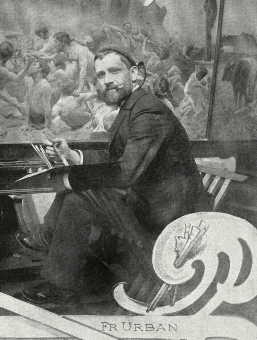 Portrét – František Urban (1868-1919), Český malíř.